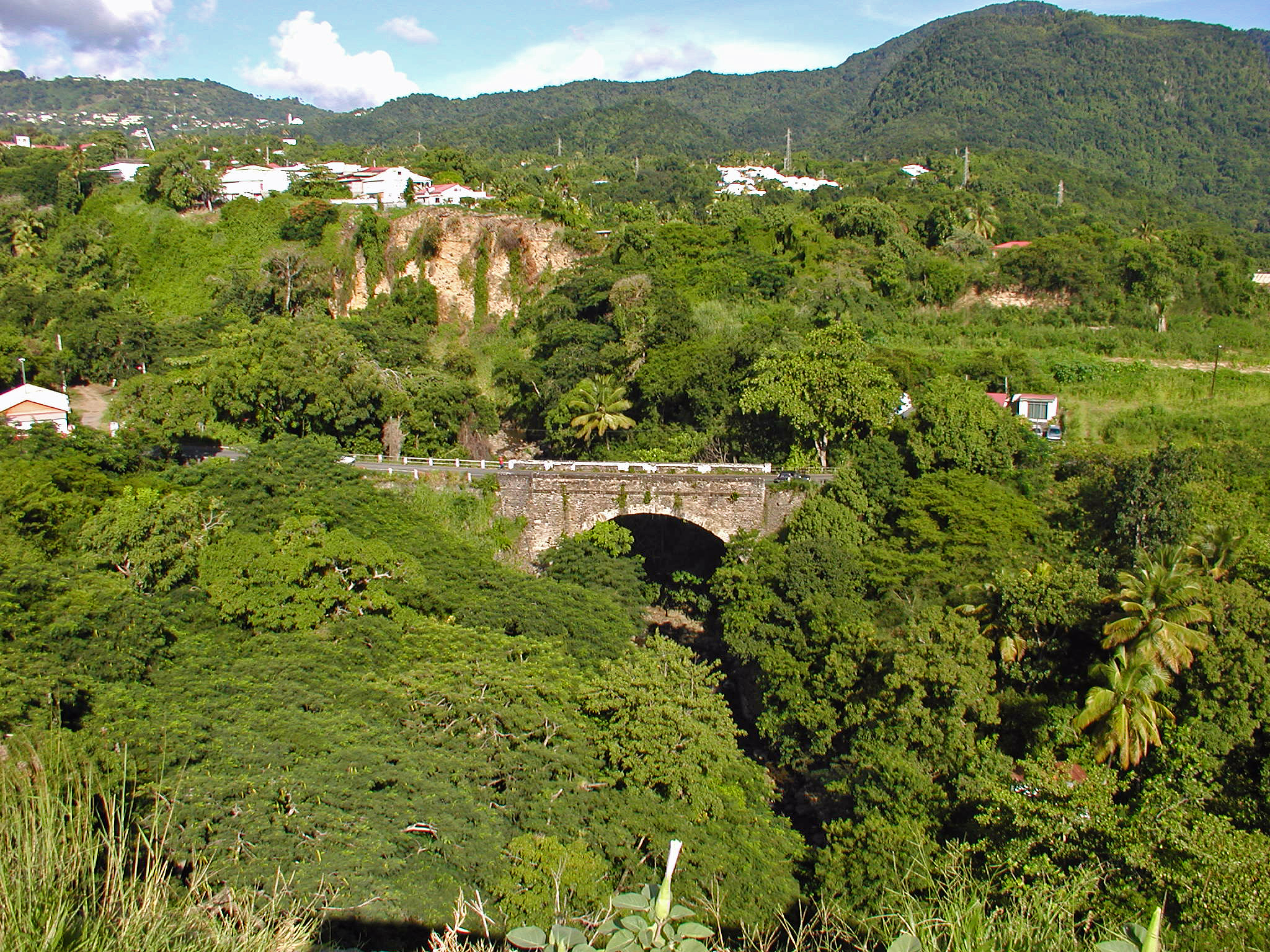 Le pont sur la rivière Galion. Le pont a été construit par l'ingénieur Labbé de Talcy de 1773 à1780. C'est un pont à une arche de 35 mètres de portée. Le Galion coule 35 mètres en dessous. The bridge over the river Galion. The bridge was built by the engineer of 1773 Labbé Talcy à1780.It is an arch bridge of 35 meters range.The galleon sank 35 meters below. Napoléon Bonaparte arrivé au pouvoir en fin 1799 décide de rétablir l'esclavage aboli par la Convention. Les Guadeloupéens qui ont goûté à la liberté résistent. La résistance s'organise, Ignace officier de Pointe à Pitre rejoint avec ses hommes un autre insurgé, Louis Delgrès (Un officier mulâtre libre). Le 21 mai 1802 le général Richepance donne l'assaut au fort où sont réfugiés Delgrès, Ignace et leurs hommes. Le 22, devant les bombardements, Delgrès et Ignace sortent par la poterne du Galion. Ignace prend la route de Pointe-à-Pitre il mourra dans les combats. Delgrès se rend au Matouba à Saint-Claude. Degrès et ses compagnons se feront sauter au cri de "Vivre libre ou mourir!". La mulâtresse Solitude, enceinte, symbole de la résistance des femmes, sera pendue en novembre 1802 juste après l'accouchement. Napoleon Bonaparte came to power in late 1799 decided to reinstate slavery abolished by the Convention. Guadeloupeans who have tasted freedom resist.Organized resistance, Ignatius officer Pointe à Pitre joined his men another insurgent Delgrès Louis (A free mulatto officer).On May 21, 1802 General Richepance stormed the fort where refugees Delgrès, Ignatius and their men.On 22, before the bombing, and Ignace Delgrès exit through the gate of Galion. Ignatius goes on the road in Pointe-à-Pitre he dies in battle.Delgrès Matouba goes to Saint-Claude.Degrees and his companions will jump to the cry of 'Live Free or Die!".The mulatto Solitude, pregnant, a symbol of women's resistance, will be hanged in November 1802 just after childbirth.